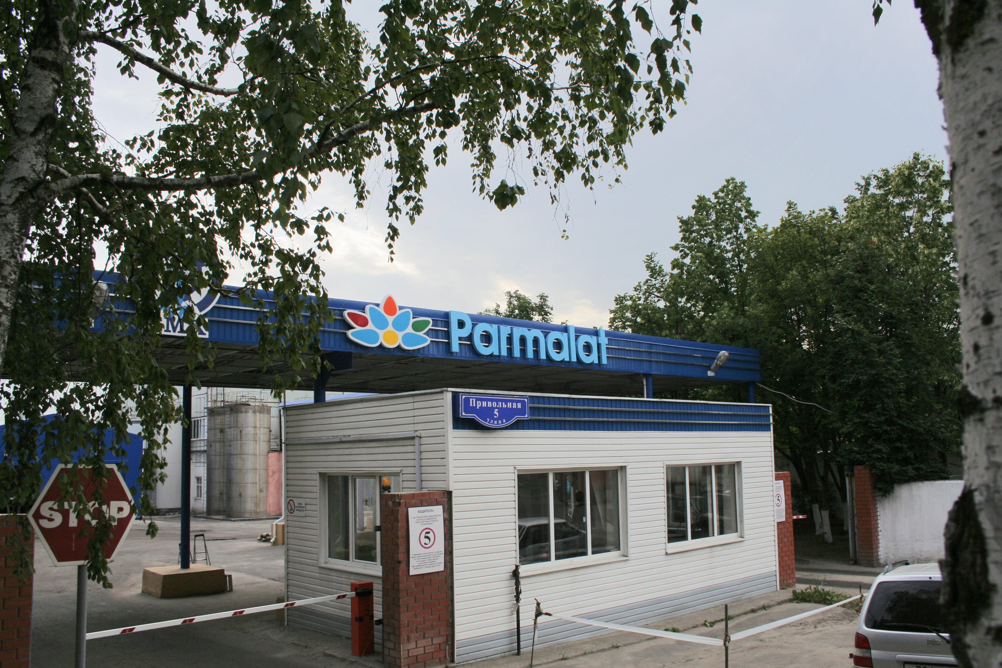 Parmalat (Белгородский молочный комбинат). Город Белгород.